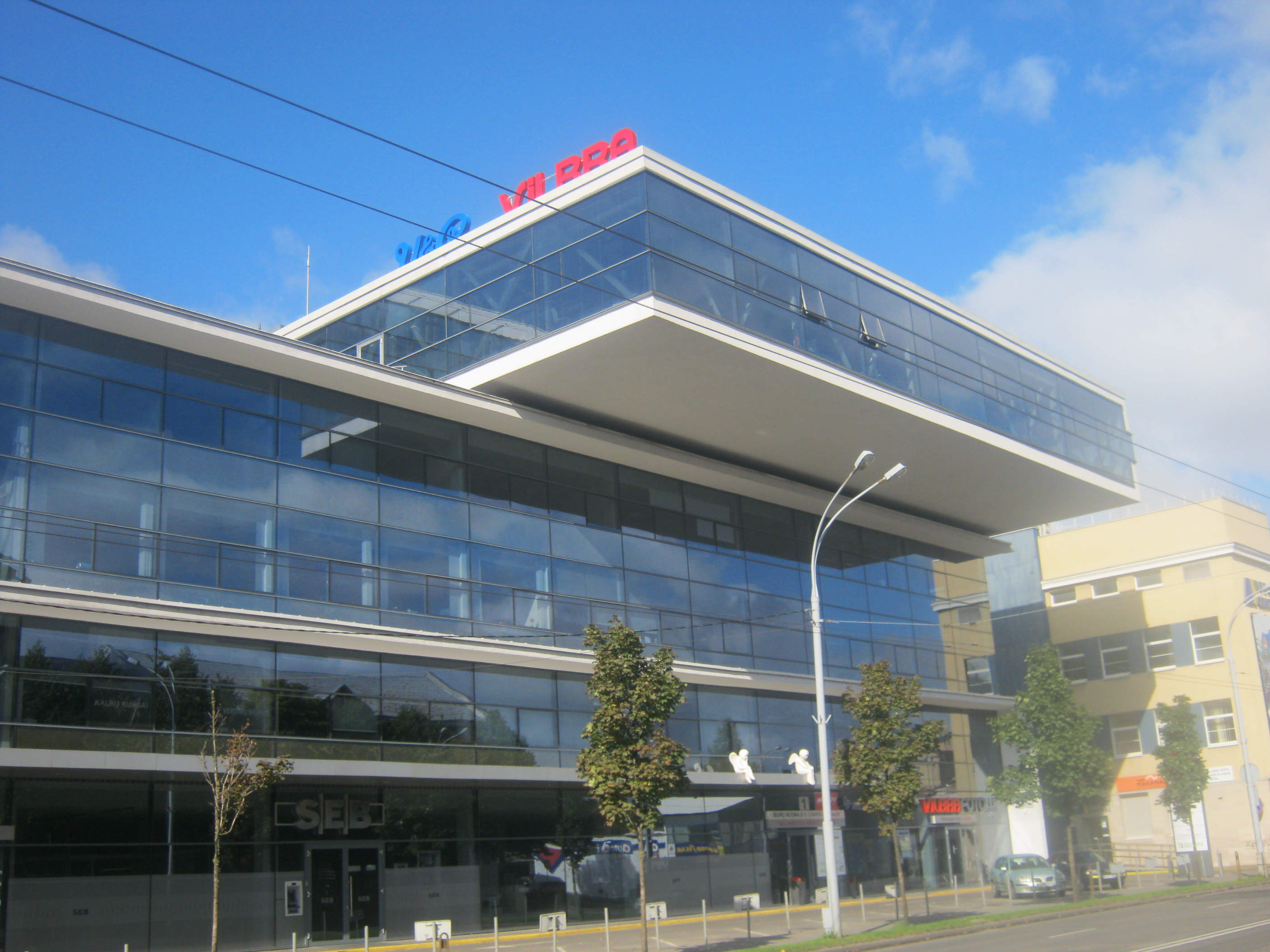 Naujamiesčio verslo centras